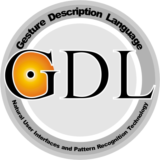 Oficjalne logo technologii GDL, wersja kolorowa